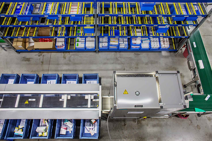 halbautomatischer Kommissionierer für Arzneimittelpackungen mit angeschlossener Objekterkennungseinheit und Sorter